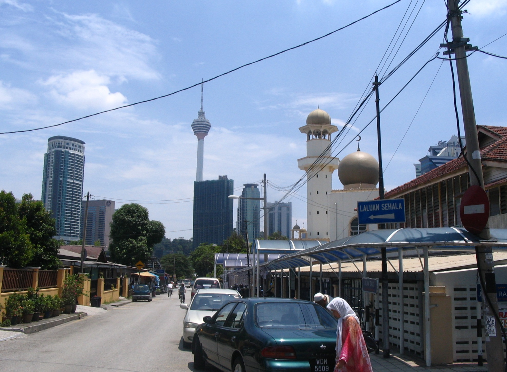 Kampung Baru - Jalan Daud - KL tower - Kuala Lumpur - Malaisie